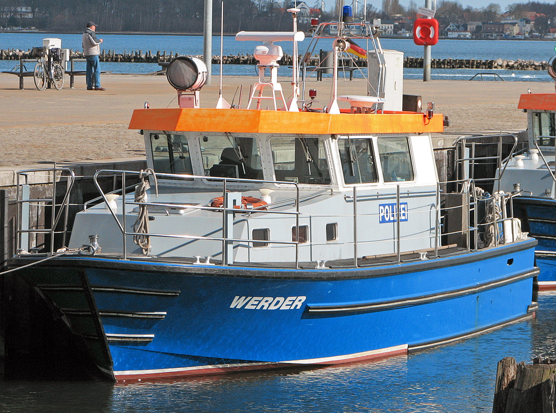 Beschreibung: Binnenstreifenboot Werder der Wasserschutzpolizei Mecklenburg-Vorpommern 13 m Polizeiboot/Fischereiaufsichtsboot (FPB 13) / Baujahr 1996 Fotograf: Darkone, 24. März 2006